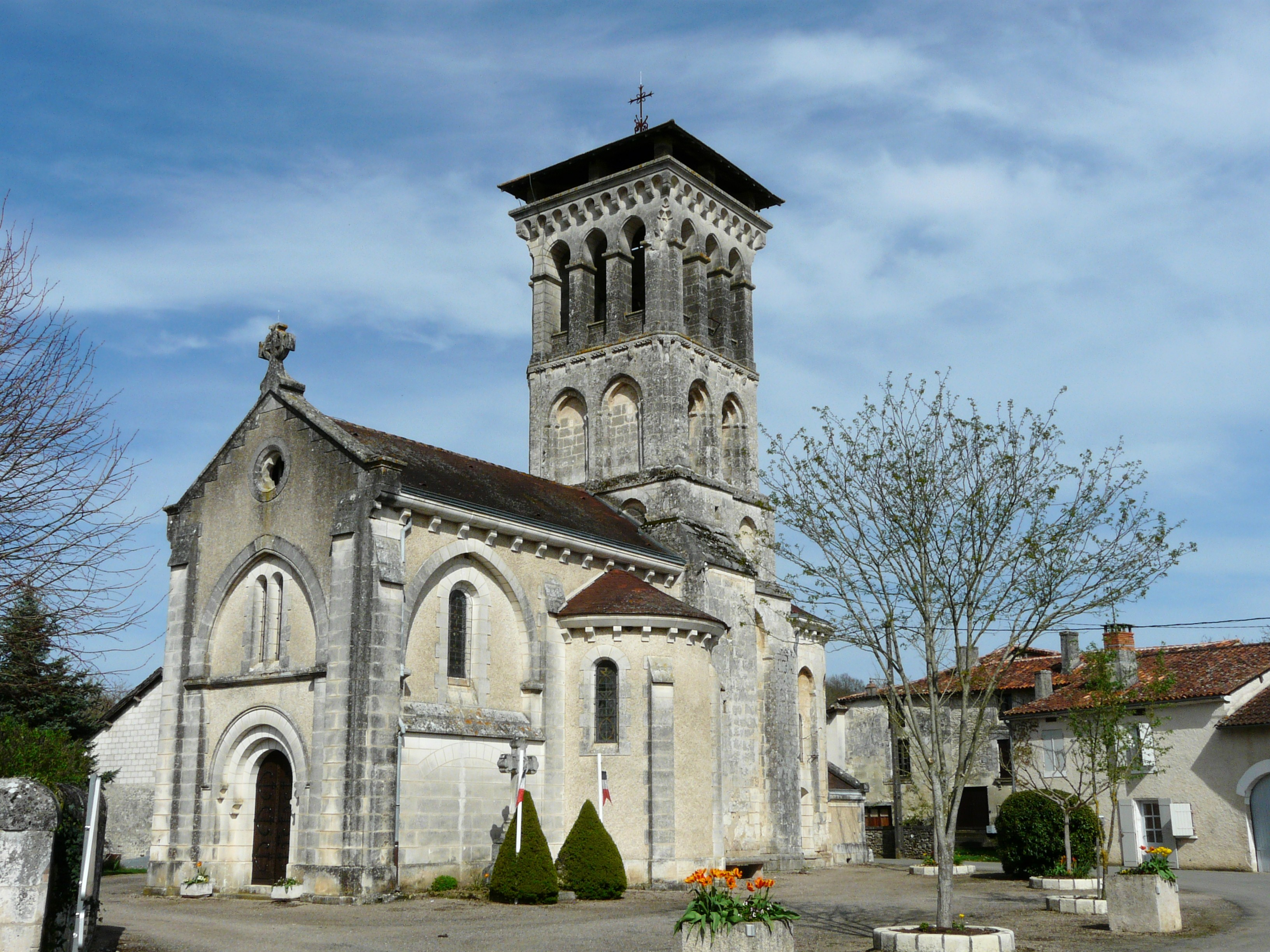 L'église Saint-Barthélemy vue du sud-ouest, Creyssac, Dordogne, France.